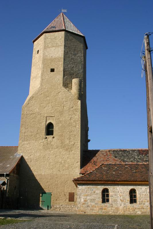 Freckleben, eigenes Foto, public domain, Bergfried von 1200- Hofseite, Mewes